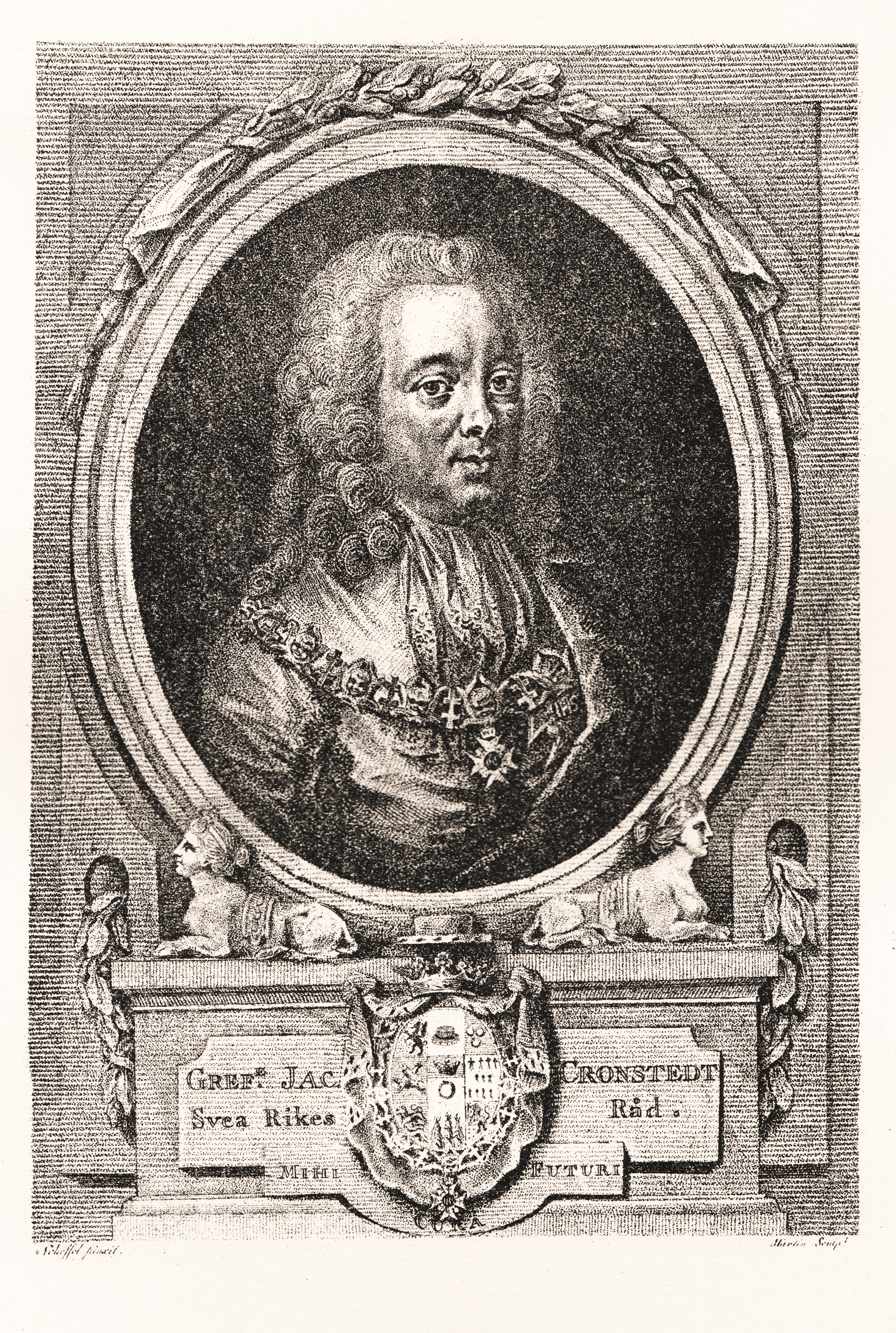 Jacob Cronstedt (1668-1751).